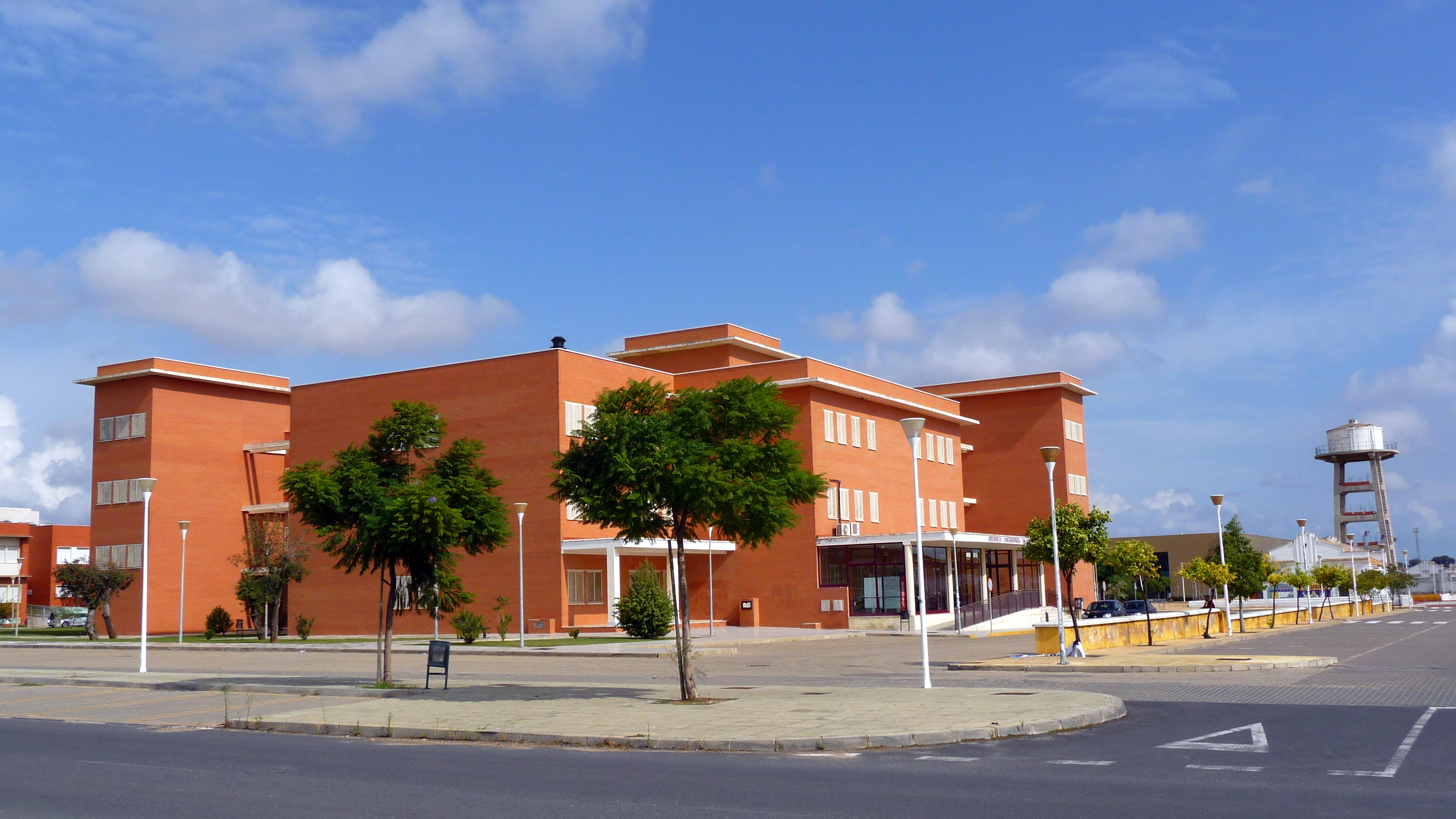 Biblioteca universitaria de Huelva